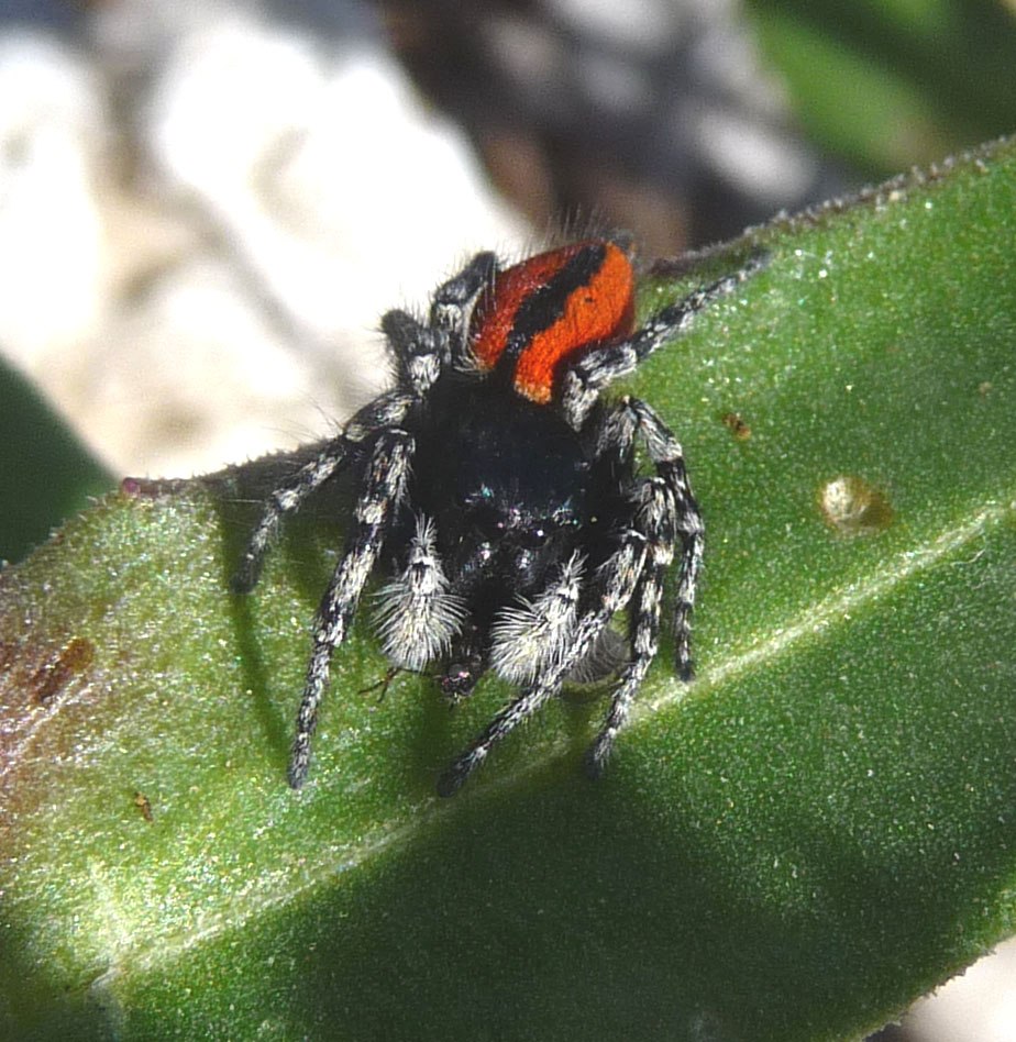 Male. Philaeus chrysops